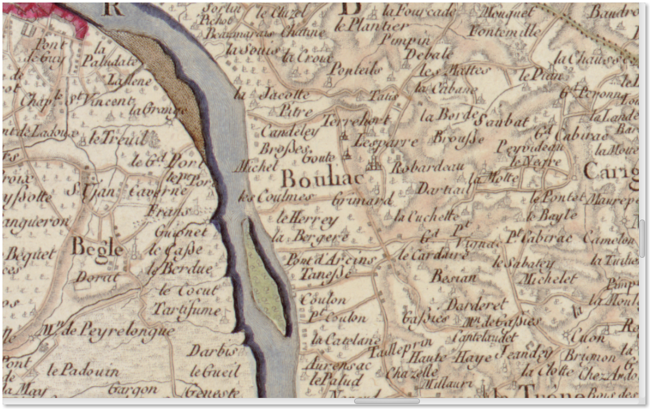 Carte de Cassini n°104 (Bordeaux, zoom sur Bouliac), 1756.